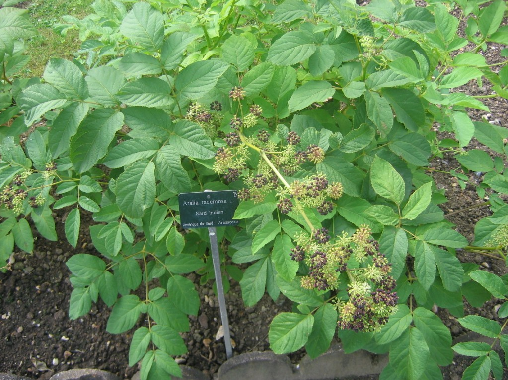 Aralia Racemosa (nard indien). Jardin des Plantes de Paris.